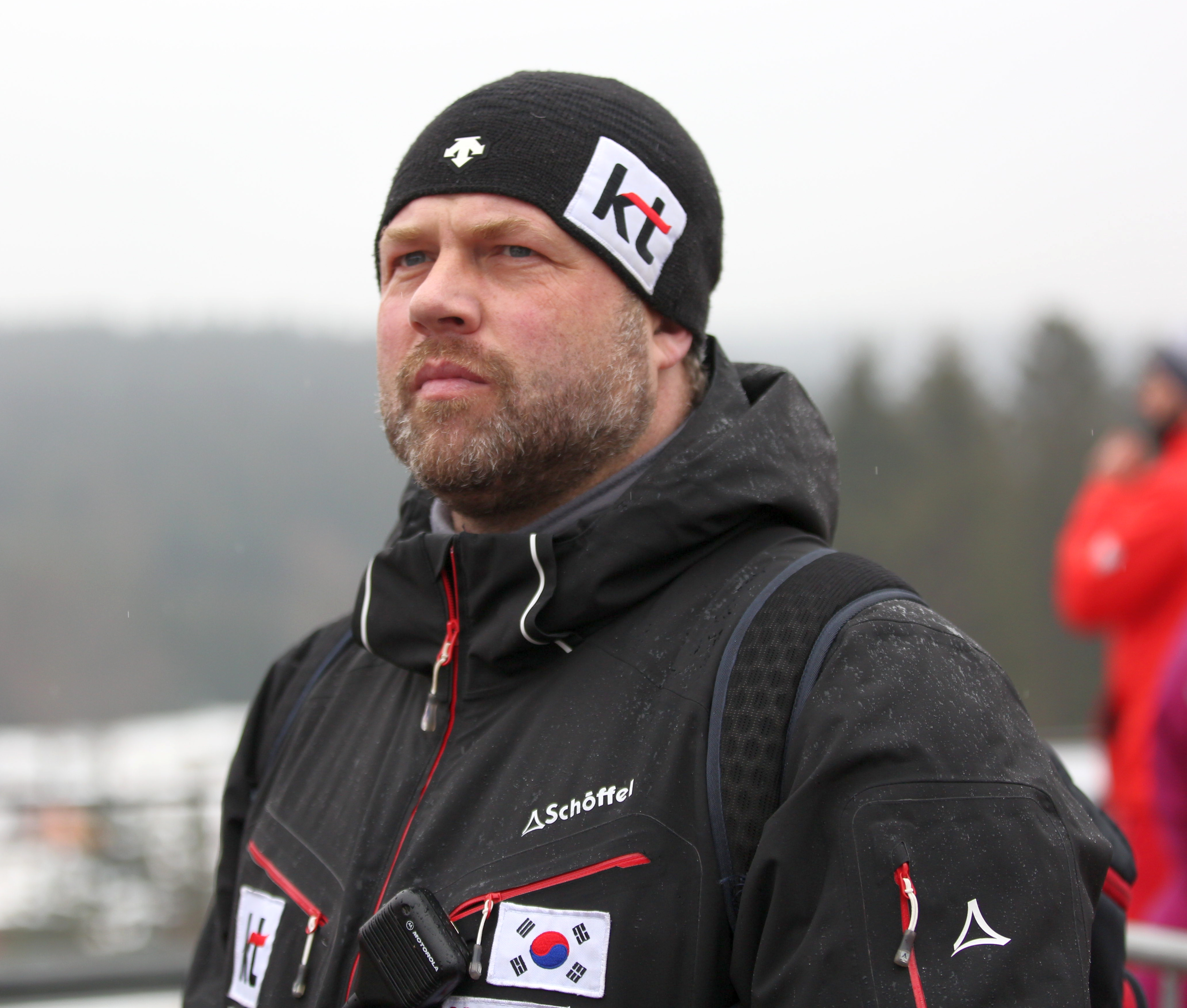 Steffen Skel beim HELABA Nationscup in Oberhof 2017